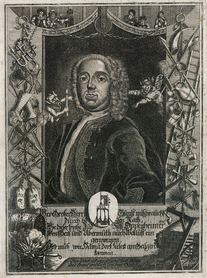 Spottporträt des Joseph Süß Oppenheimer mit dem eisernen Galgen als Emblem und umgeben von Foltereinstrumenten und Teufelsdarstellungen.